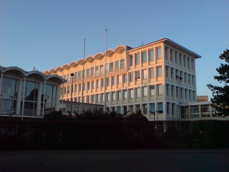 Hauptgebäude des Bundeskriminalamt (Deutschland), von der Thaerstraße in Wiesbaden aus gesehen.